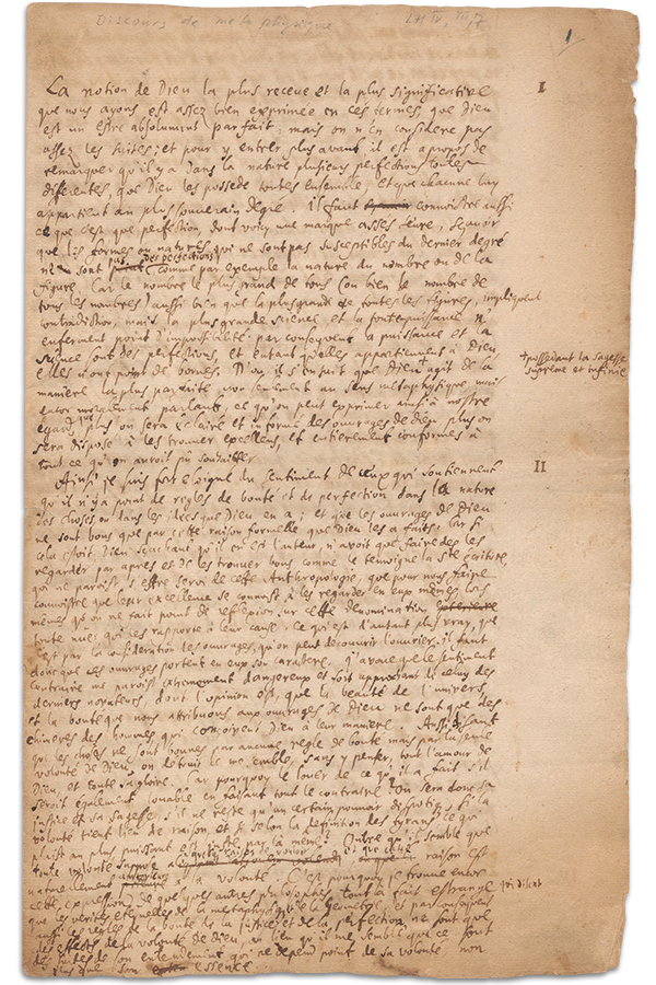 Первая страница рукописи "Discours de metaphysique"